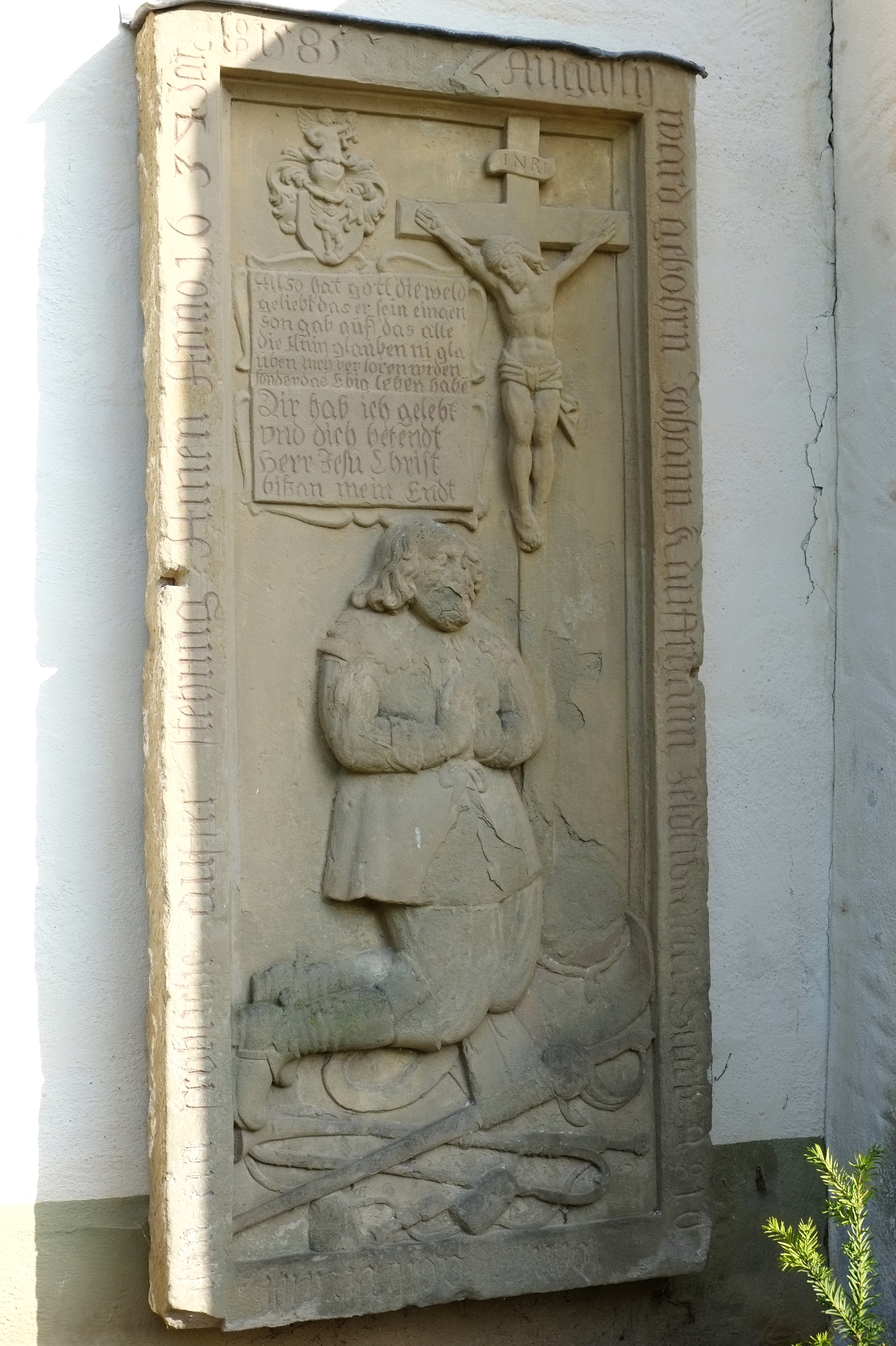 Evangelische Kirche in Giebelstadt im Landkreis Würzburg (Bayern, Deutschland)